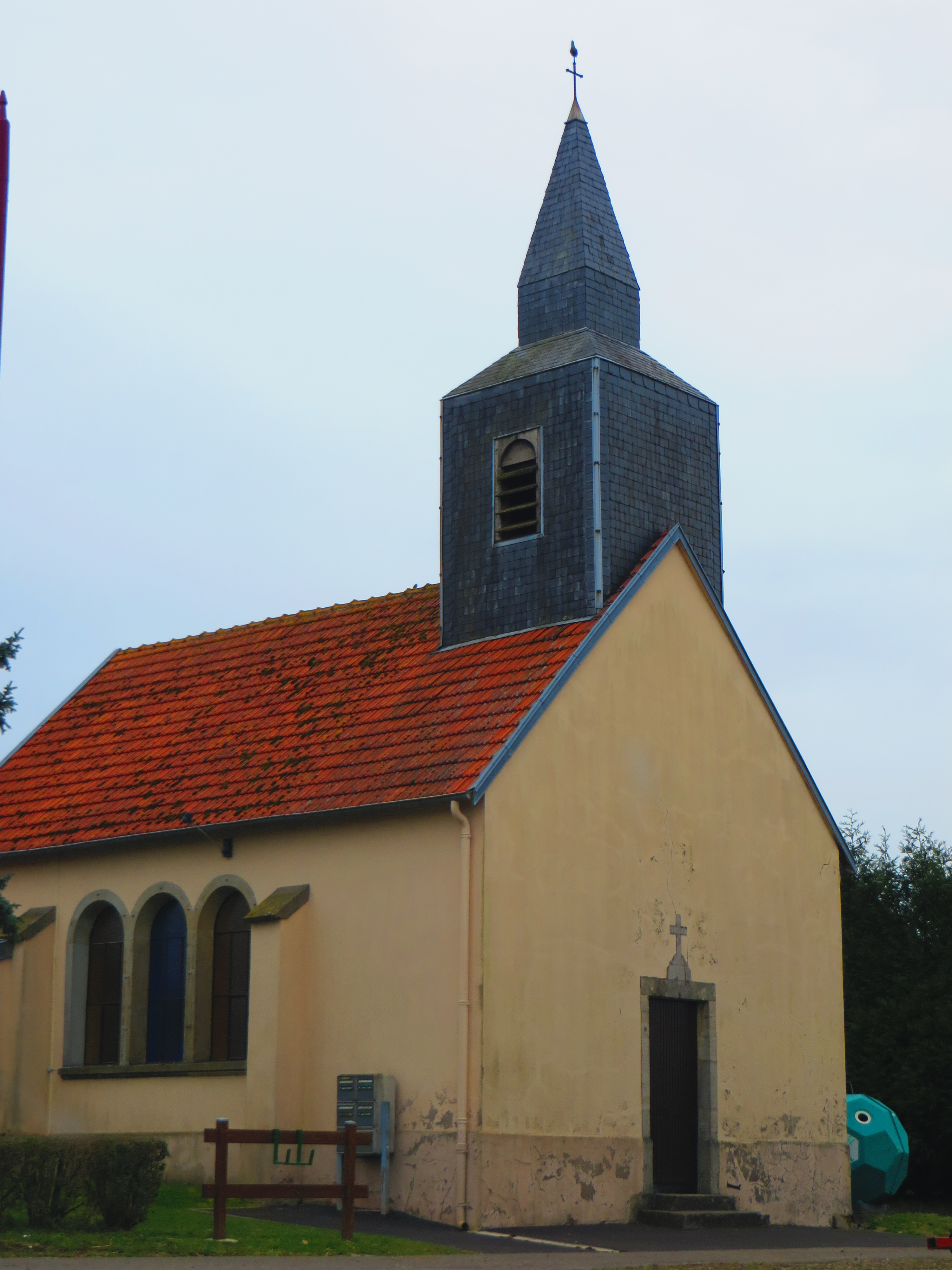 Suisse eglise